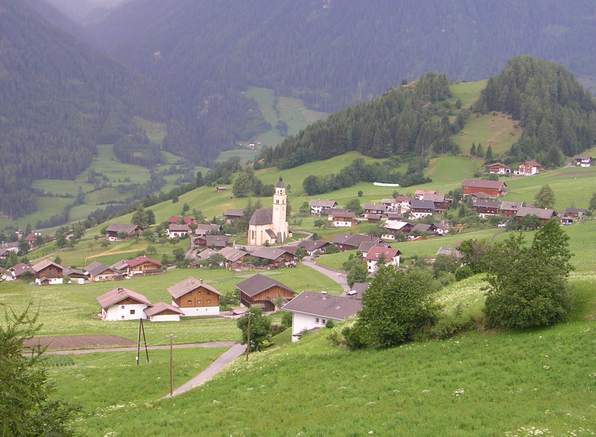 Gemeinde Virgen, Blick auf Obermauern mit der Ausgrabungsstätte Burg